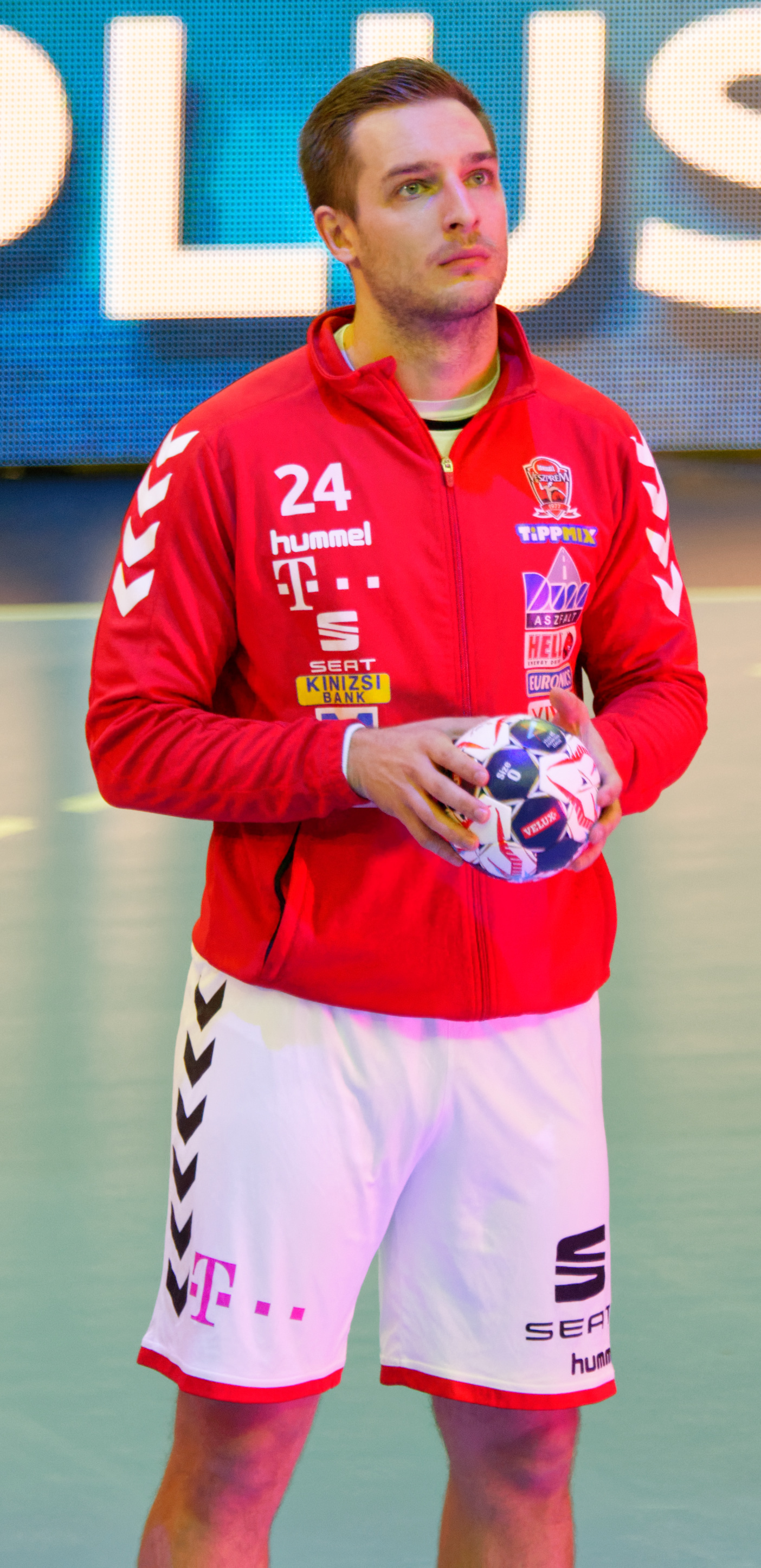 Rencontre de phase de groupe de la ligue des champions 2017/18 entre le PSG et Veszprem. A Coubertin, le 12 novembre 2017.